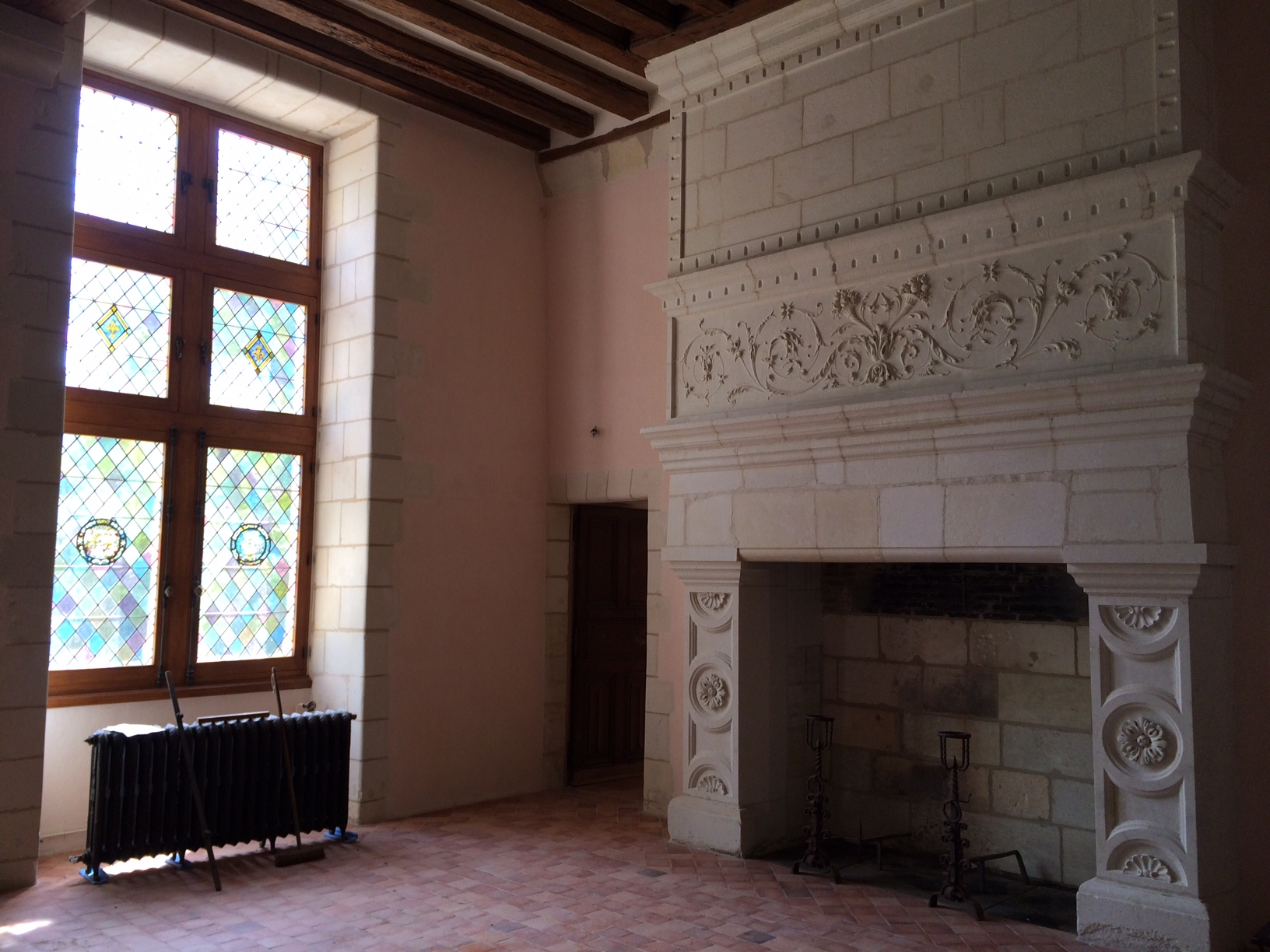 cheminée